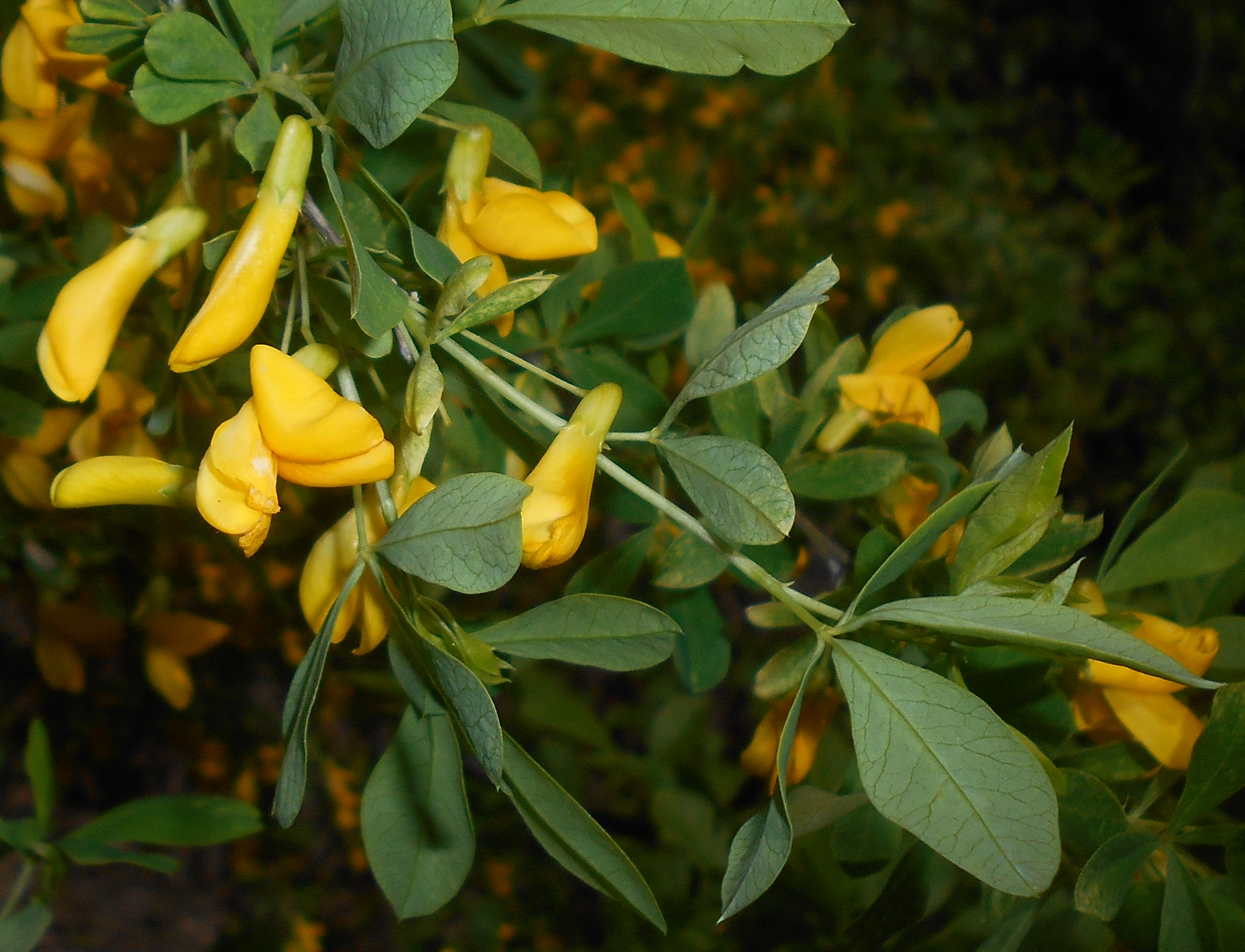 Karagana podolska (Caragana frutex), Ogród Botaniczny UMCS w Lublinie